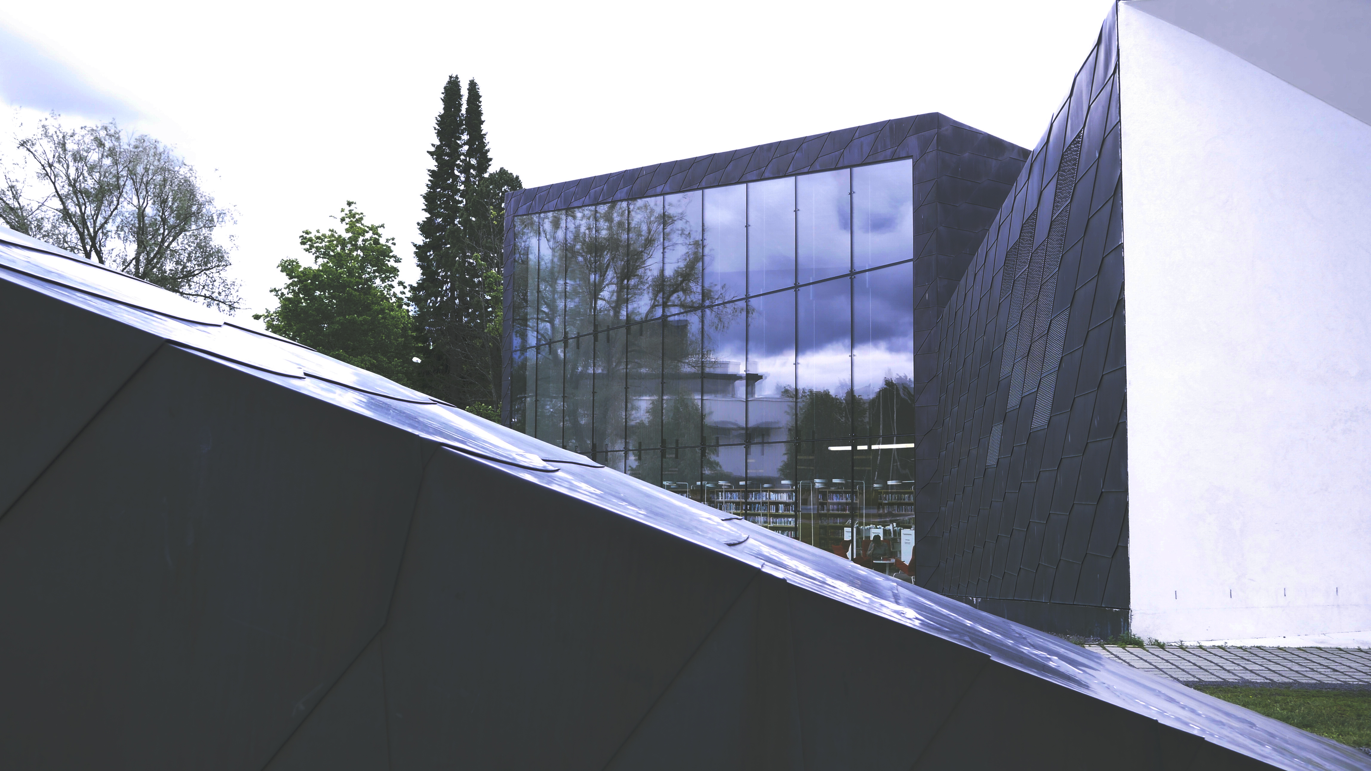 Seinäjoen Apila Kirjasto